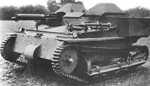 Tankietka Carden-Loyd z zamontowanymi pokrywami nad przedziałem bojowym. Drugi oryginalny model angielski z nieznacznie powiększonym (boczne nisze) przedziałem bojowym. Polska zakupiła ok. 10 wozów tego typu. Ich konstrukcja stała się podstawą do opracowania własnych wozów bojowych. [opis oryginalny]